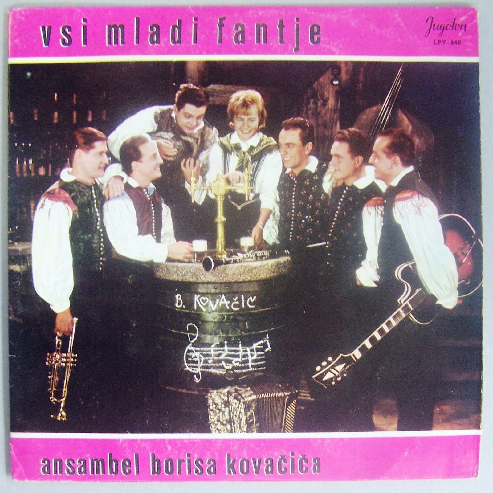 Ansambel Borisa Kovačiča - Vsi mladi fantje.